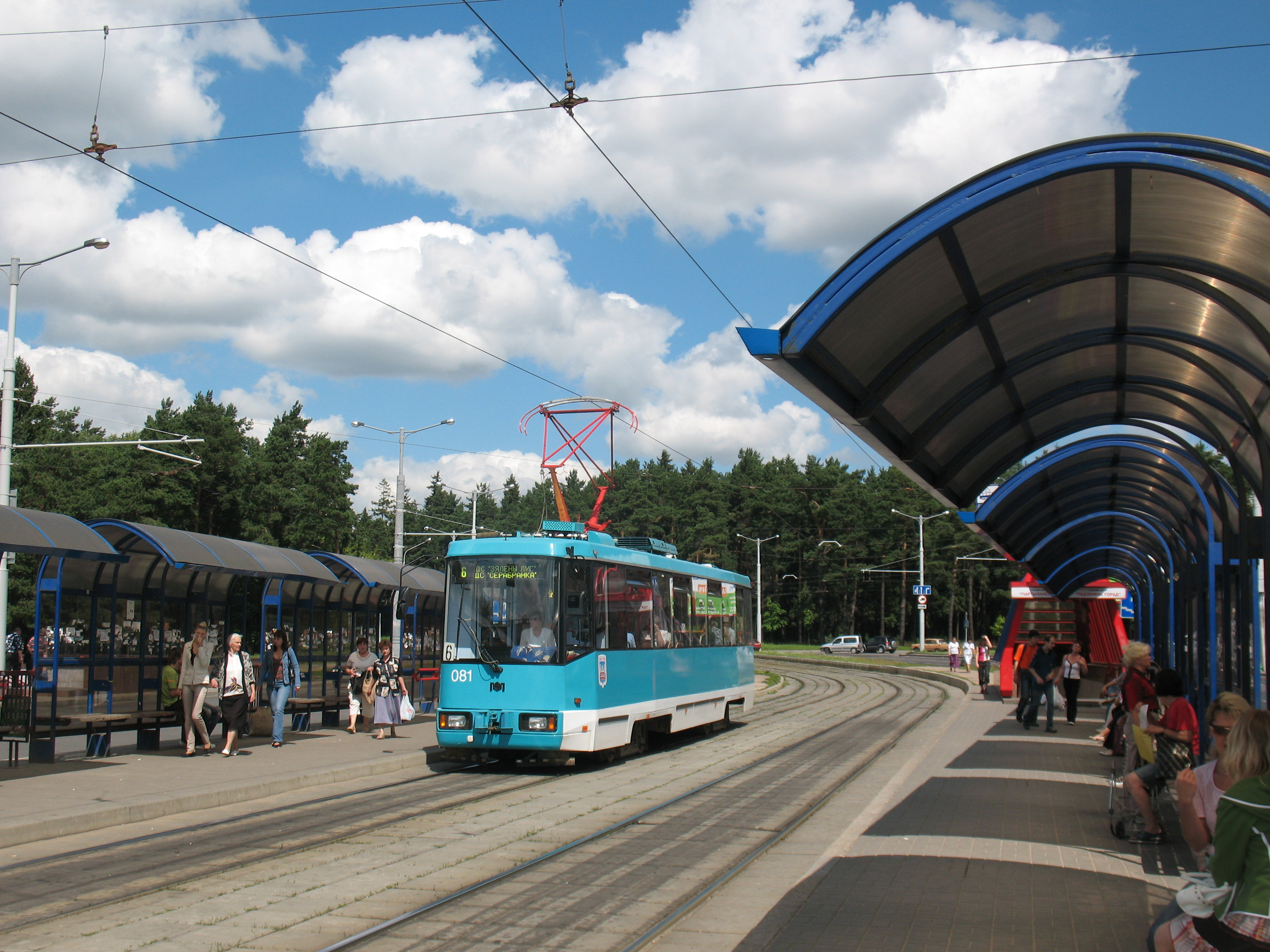 Newly repaired stop at metro Partizanskaya Минский трамвай в 2007 года